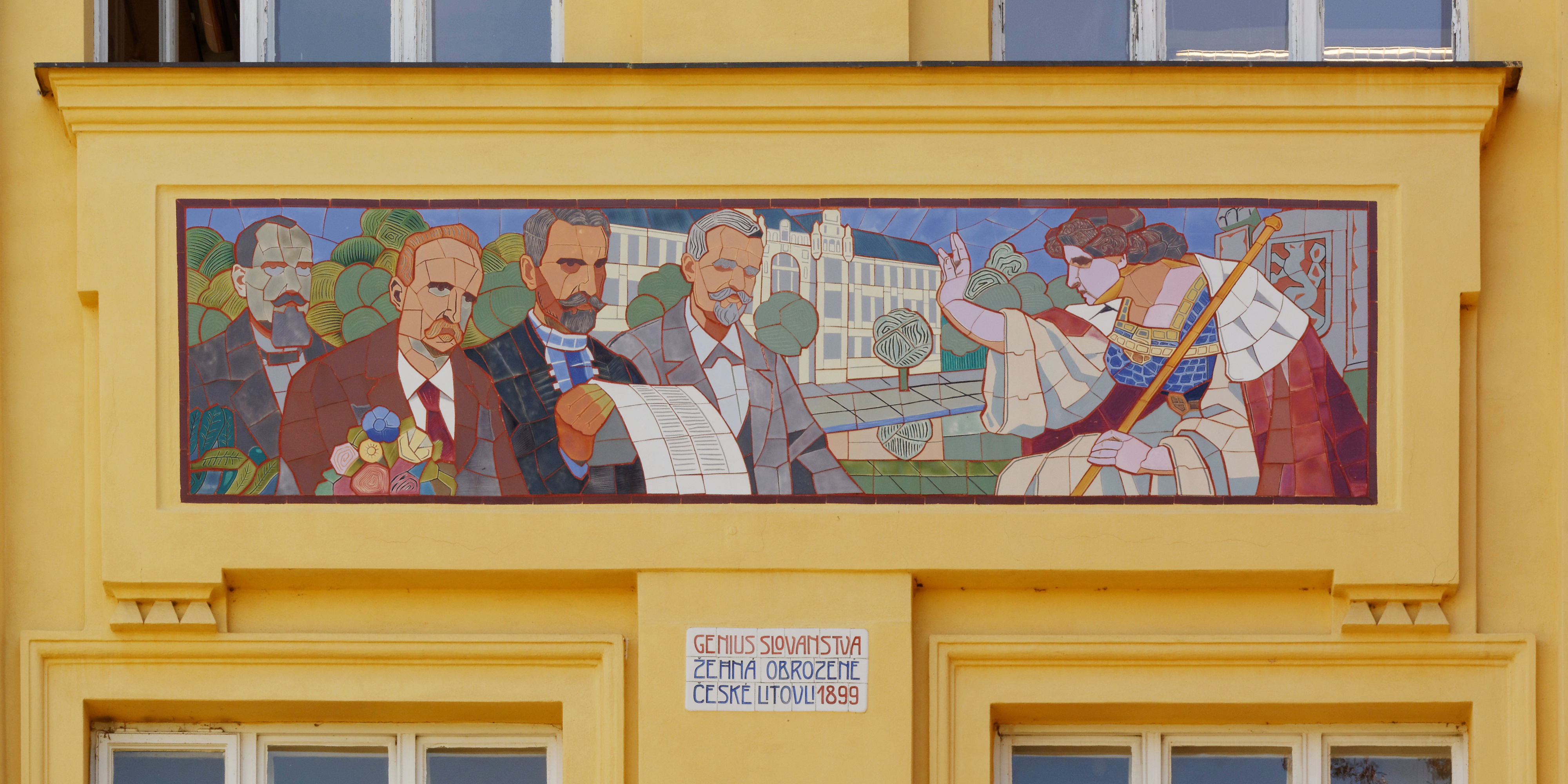 Gymnázium Jana Opletala, Opletalova 189/4, Litovel. Mozaika podle návrhu Jano Köhlera: Genius slovanstva žehná obrozené české Litovli 1899.